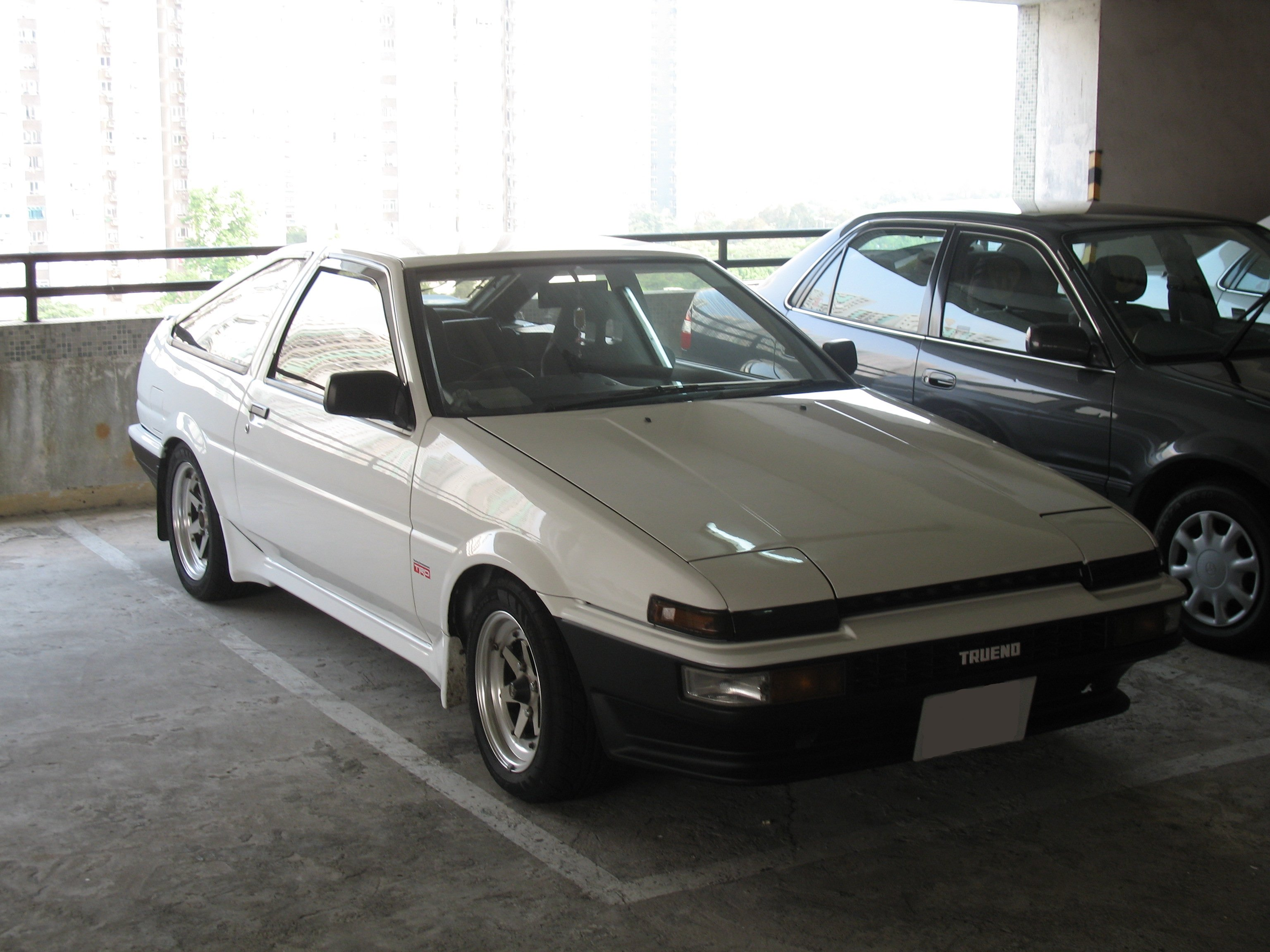 トヨタ・AE86